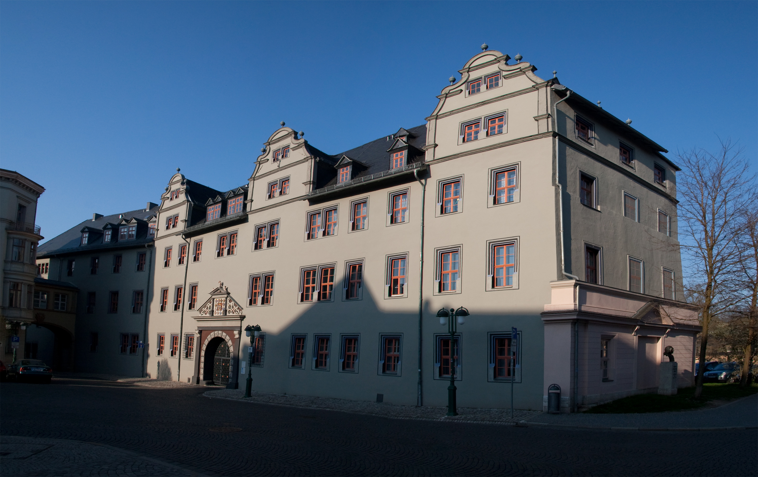 Rotes Schloss am Platz der Demokratie in Weimar